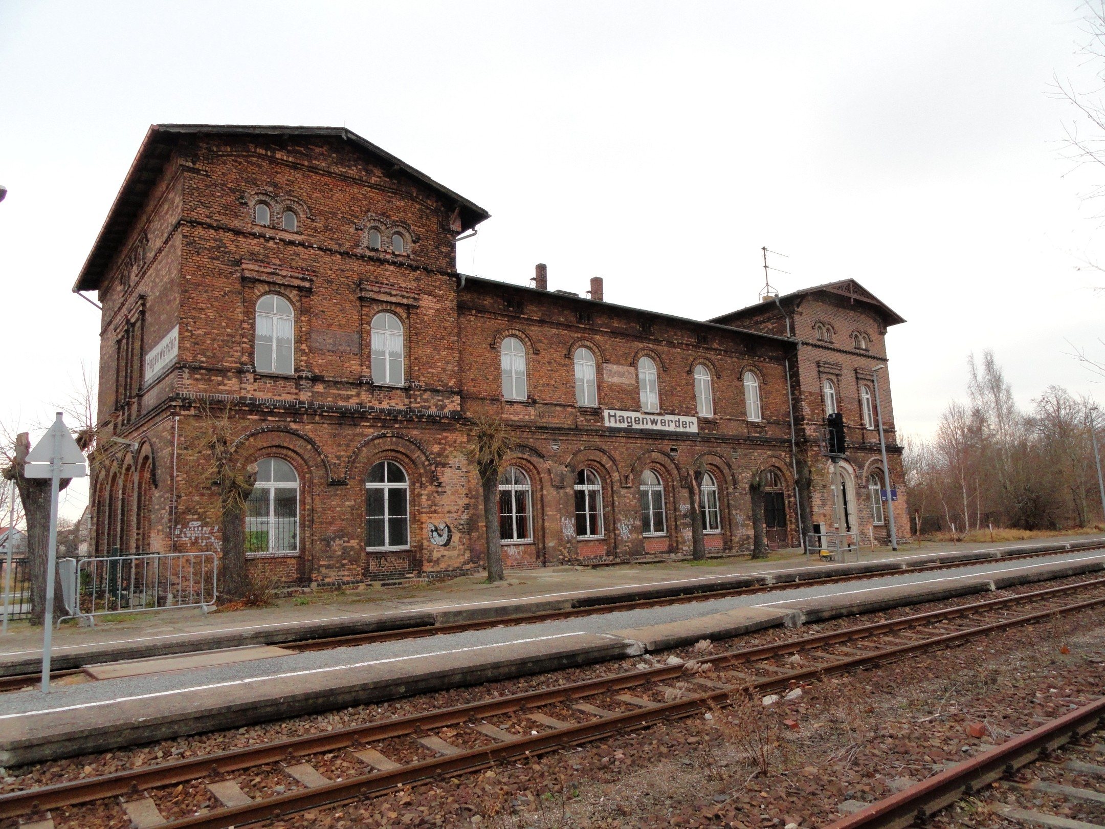 Die Bahnsteigseite des Bahnhof Hagenwerder in Ostsachsen.